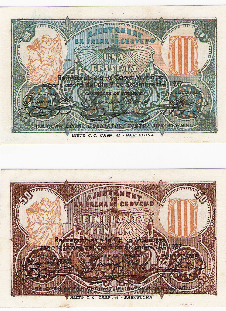 Cara i revers de paper moneda de la II República (1937) de La Palma de Cervelló